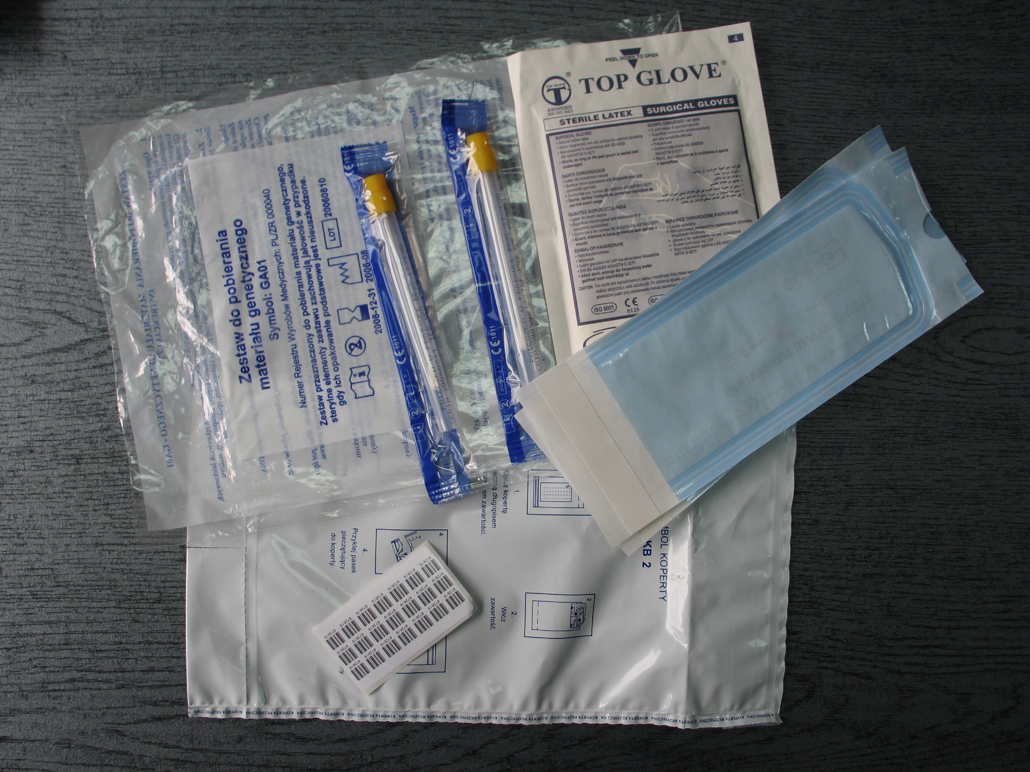 Pakiet do zabezpieczenia DNA